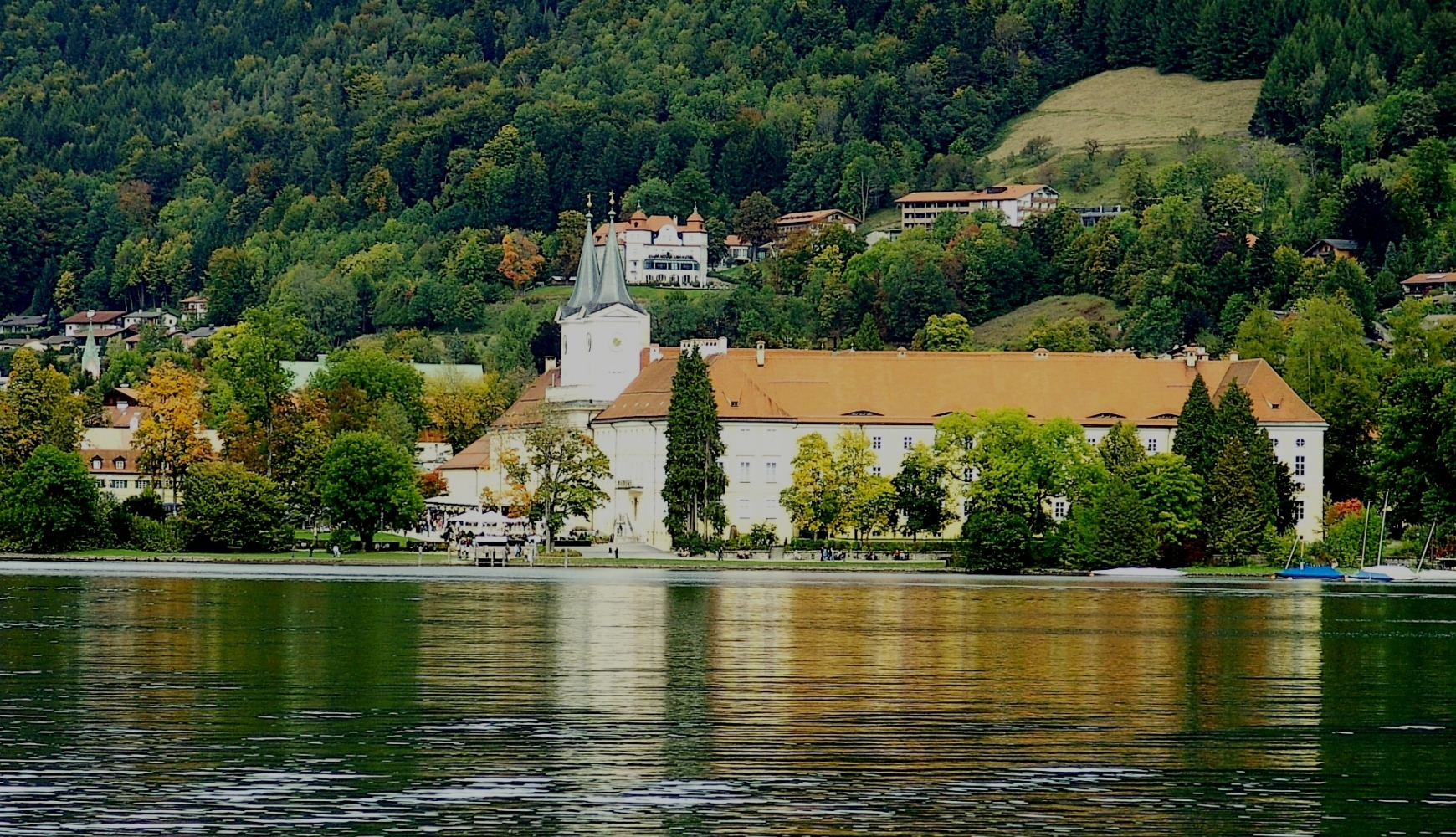 Kloster Tegernsee mit dem Tegernsee im Vordergrund im Herbst.